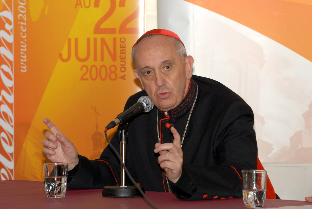 Le cardinal Bergoglio en conférence de presse à la suite de sa conférence au CEI 2008.